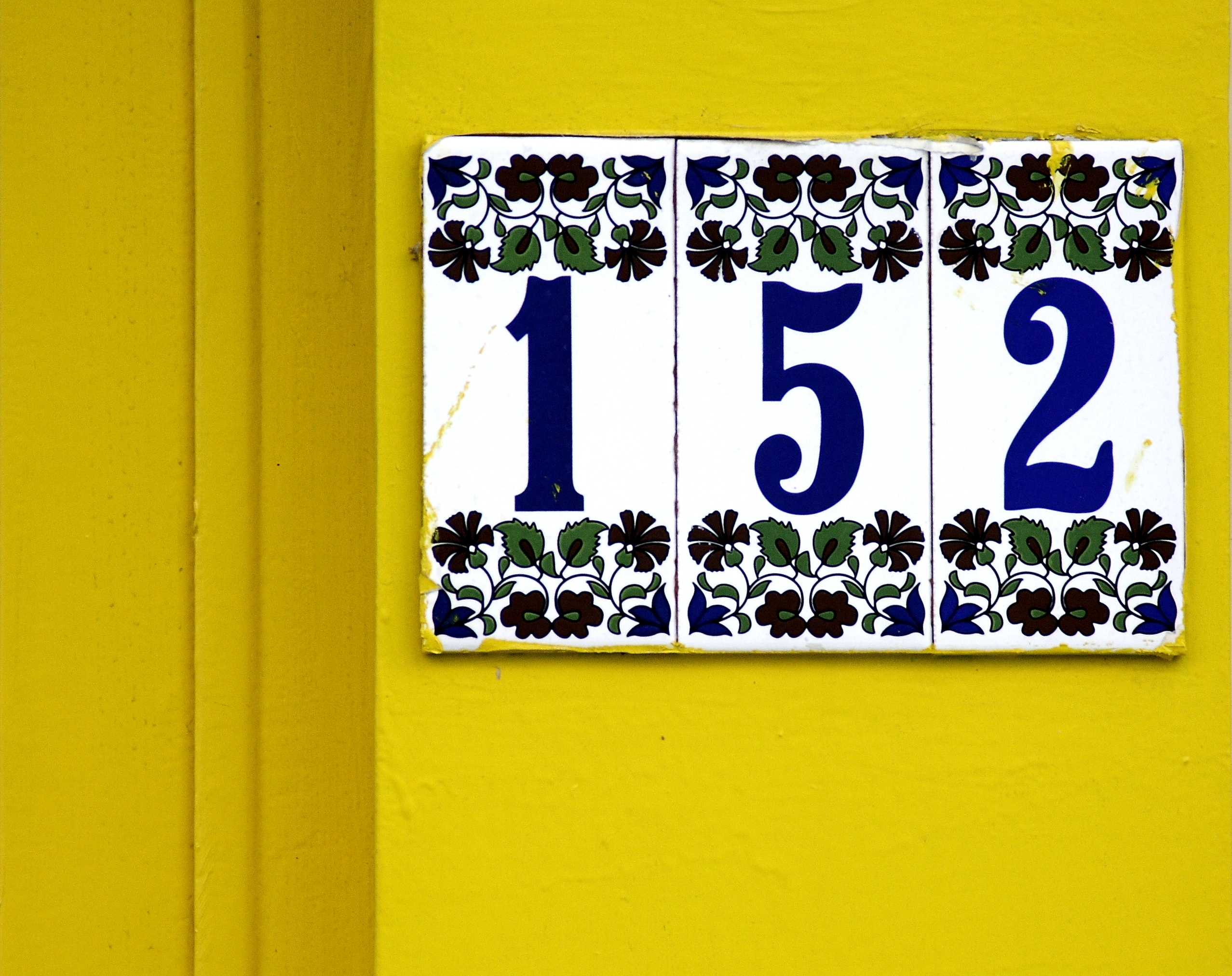 Rue du Château (Paris)